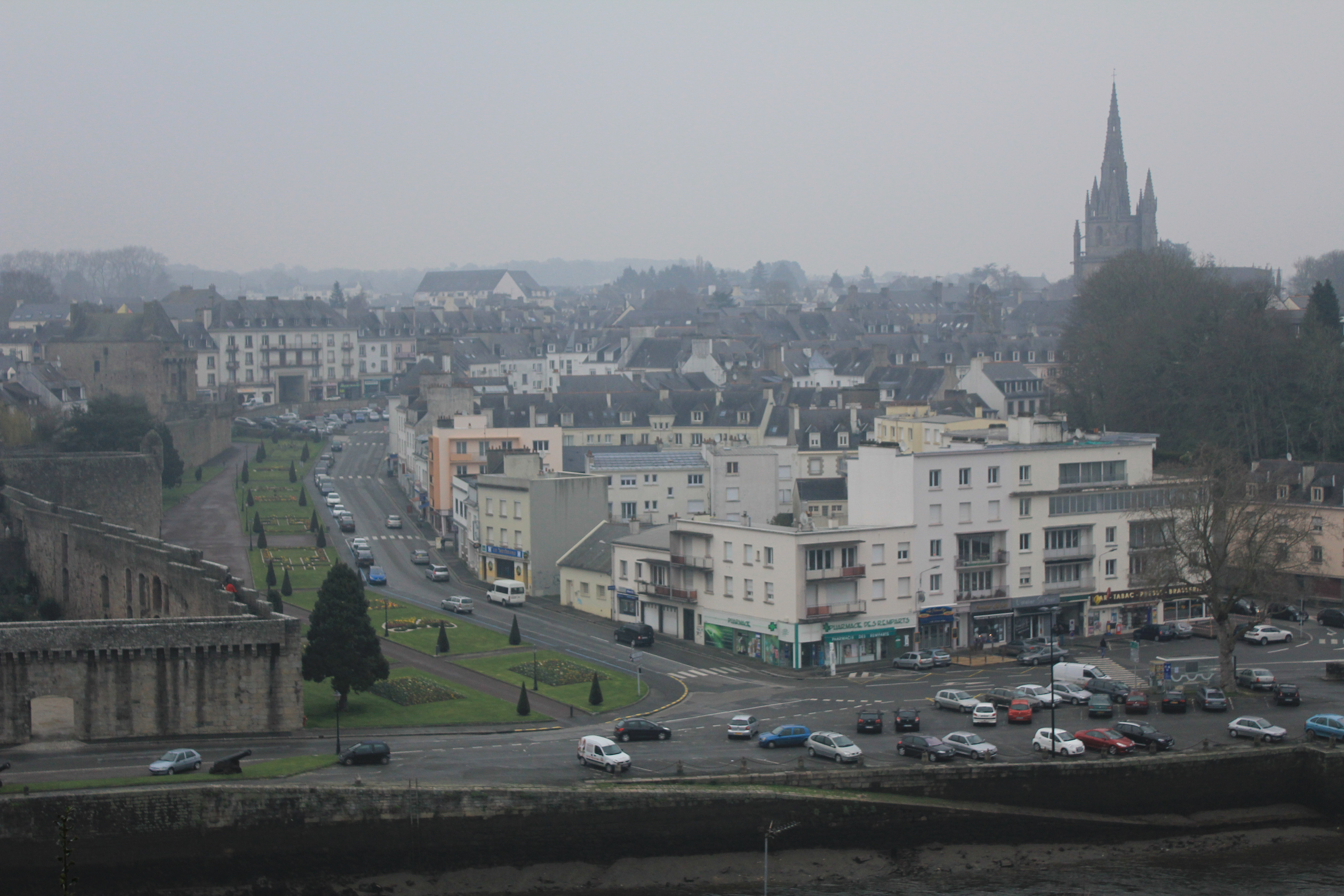 Vue de la ville d'Hennebont